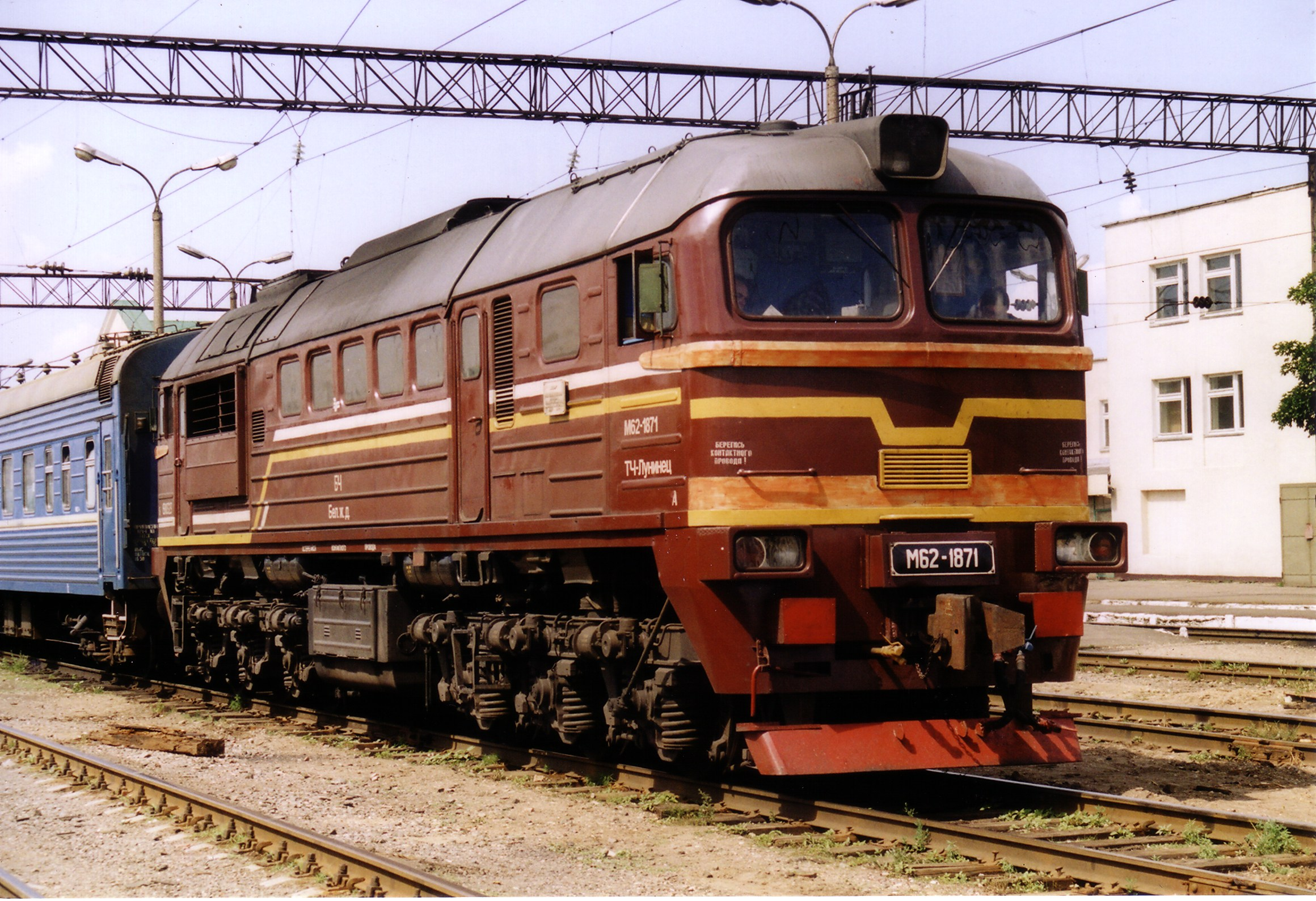 M62 diesel locomotive from Luninets depot